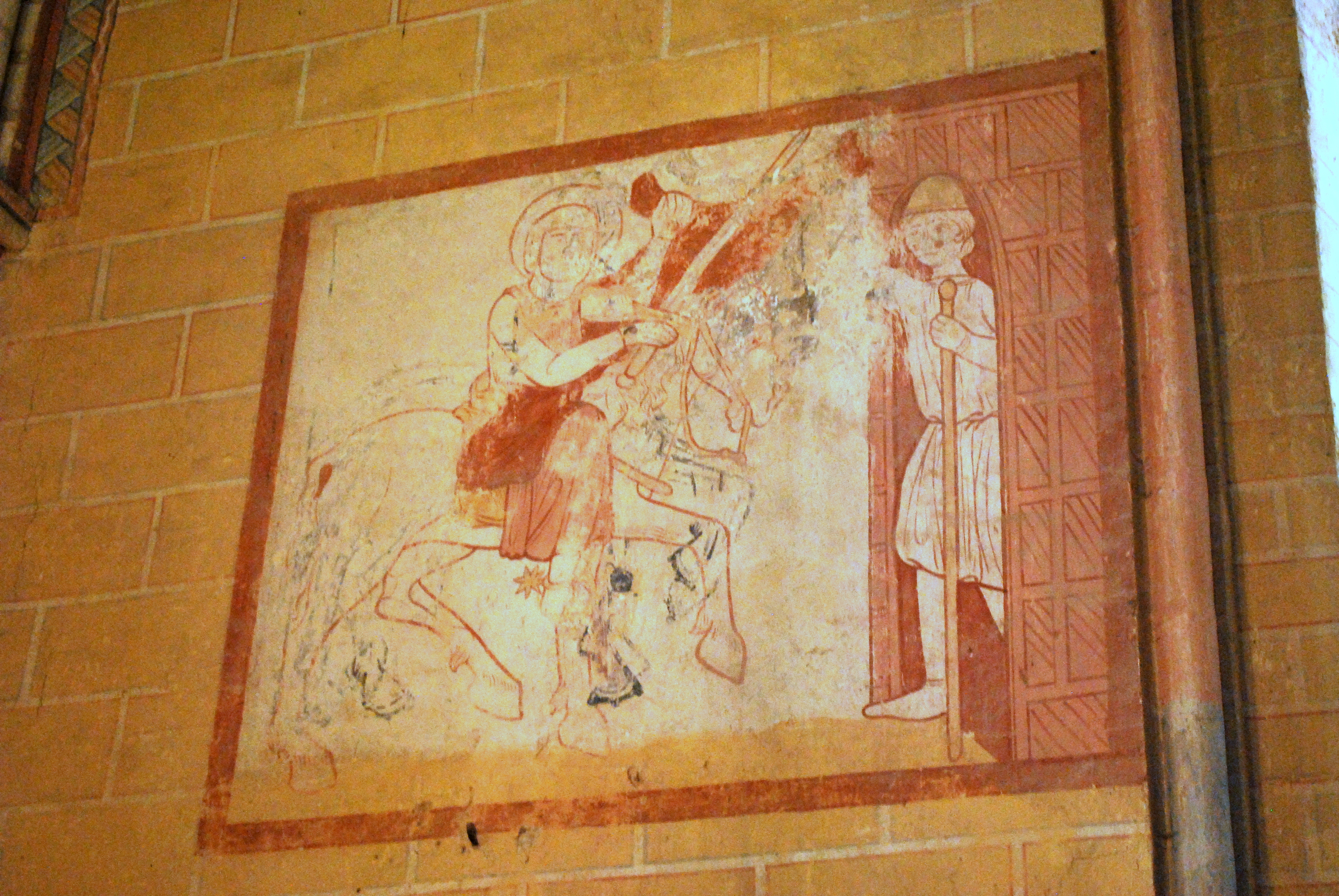 La Sauve église Saint-Pierre